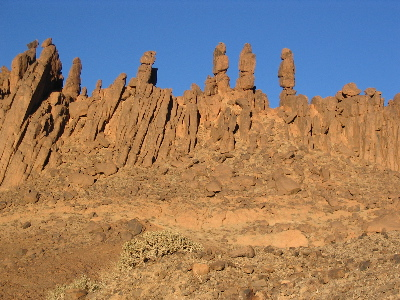 Sud de l'Algérie